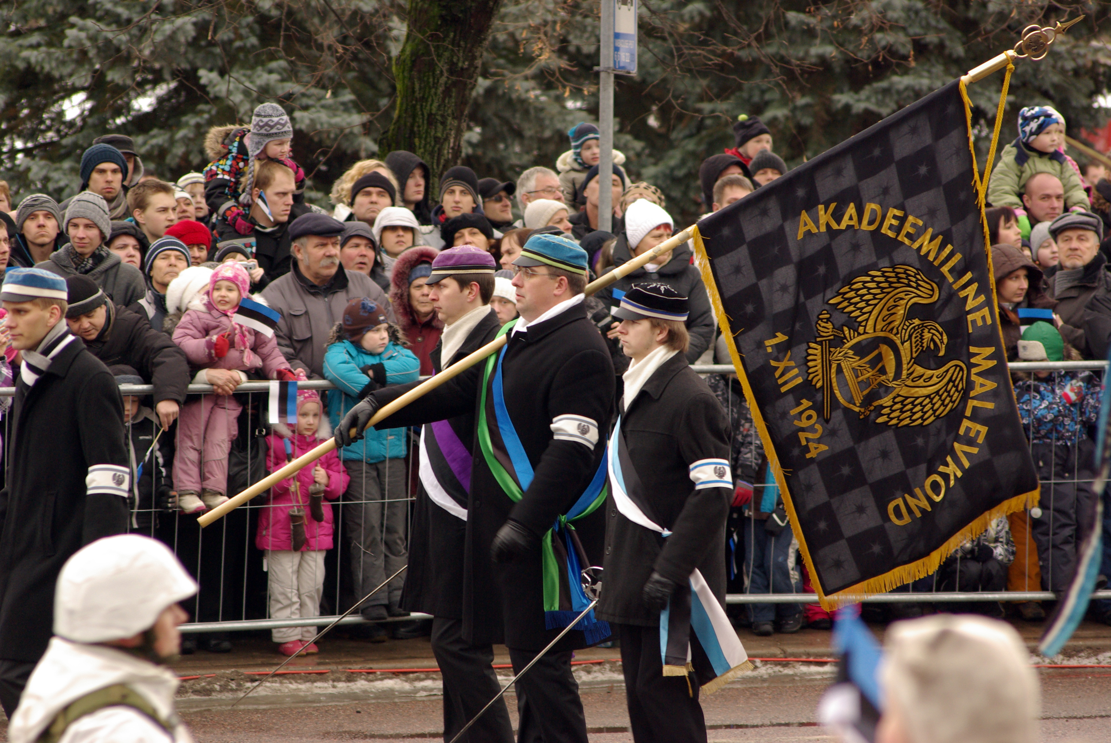 Tartu maleva Akadeemilise malevkonna lipuvalve vabariigi aastapäeva paraadil Tartus 2012.